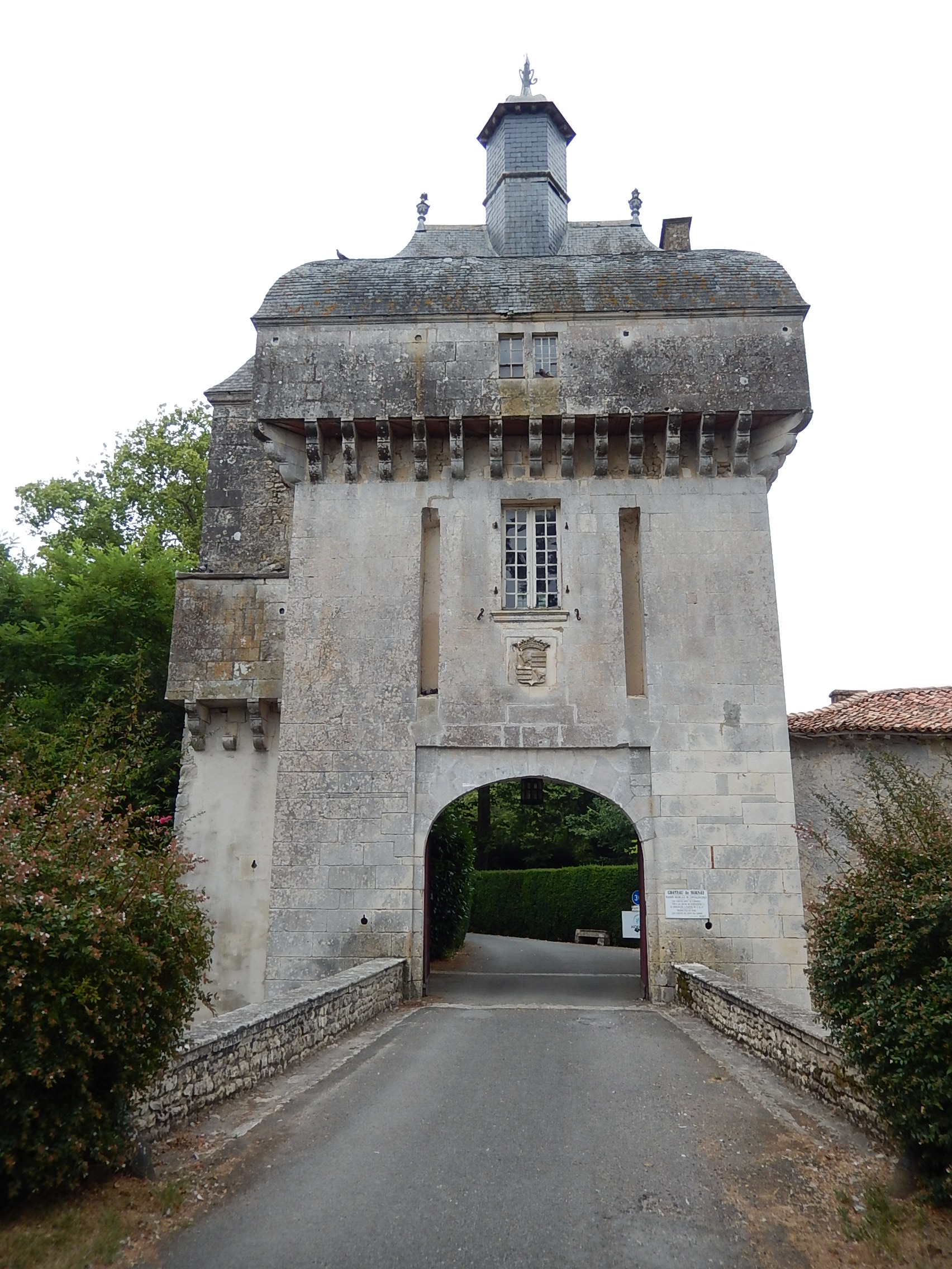 La tour Impériale du château de Mornay, à Saint-Pierre-de-l'Isle. Elle fut construite au seizième siècle.